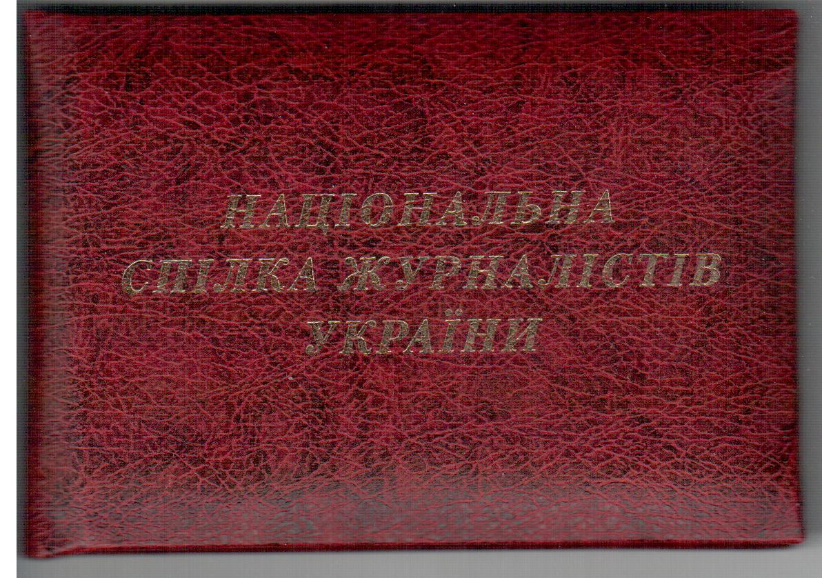 Обложка членского билета Национального союза журналистов Украины (2011 г.)